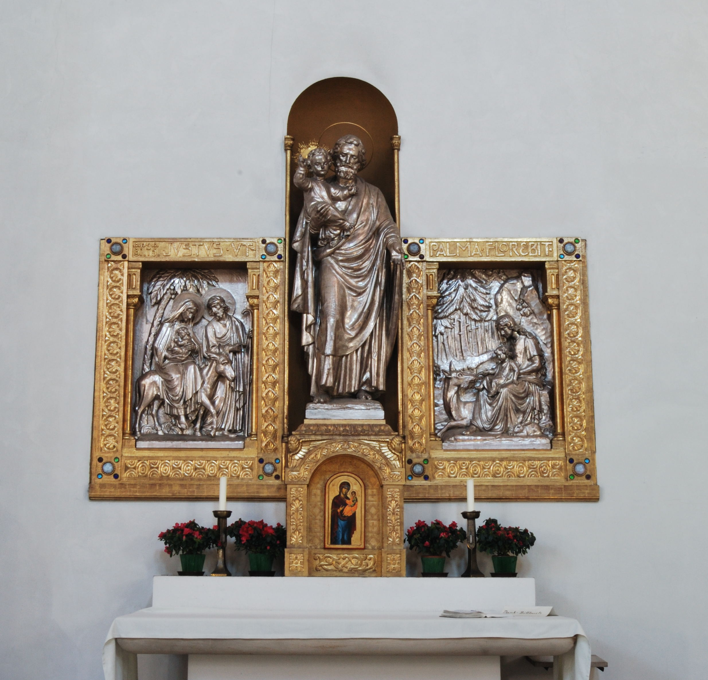 Josephsaltar im rechten Seitenschiff